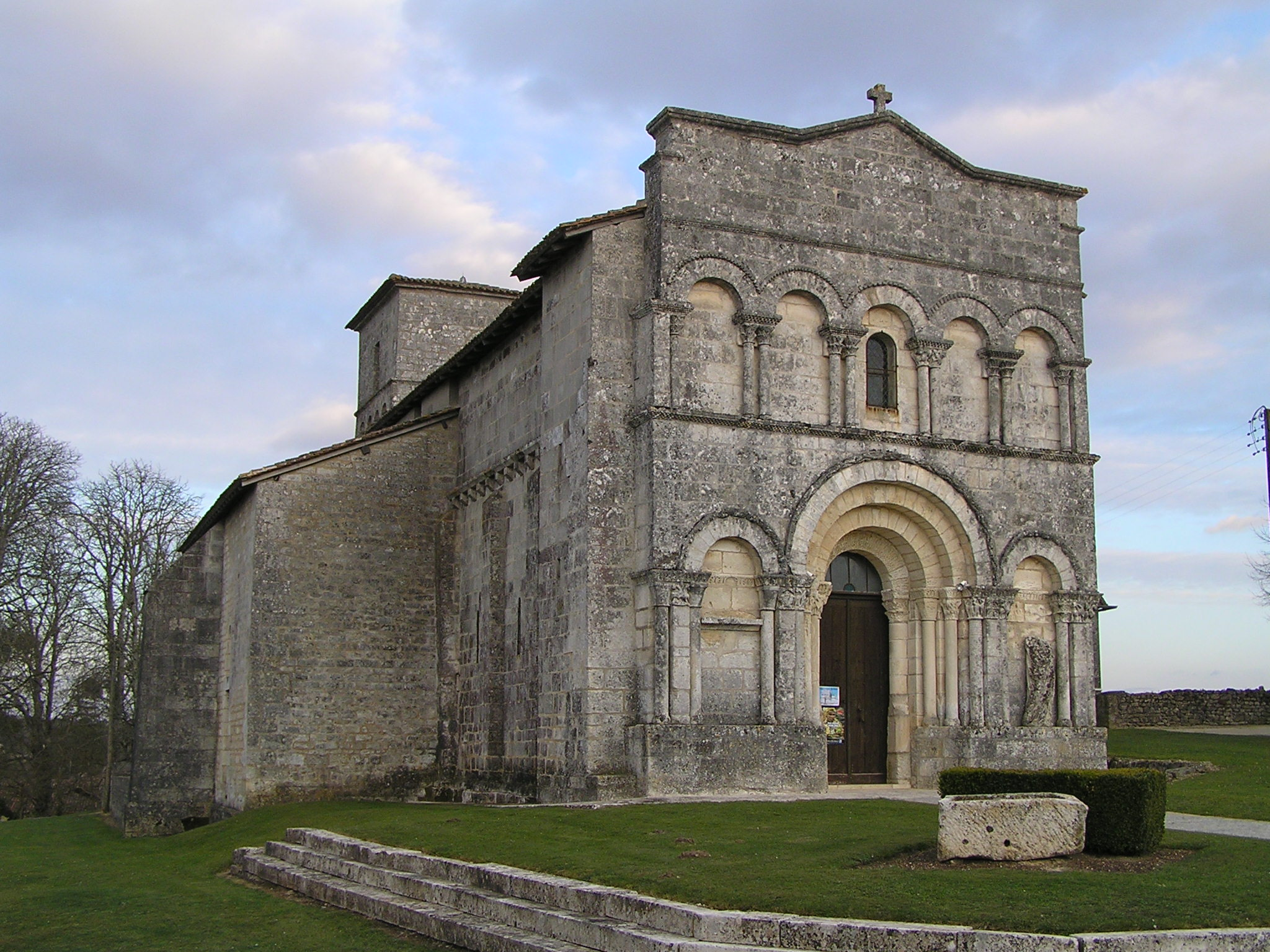 église de Dirac, Charente, France